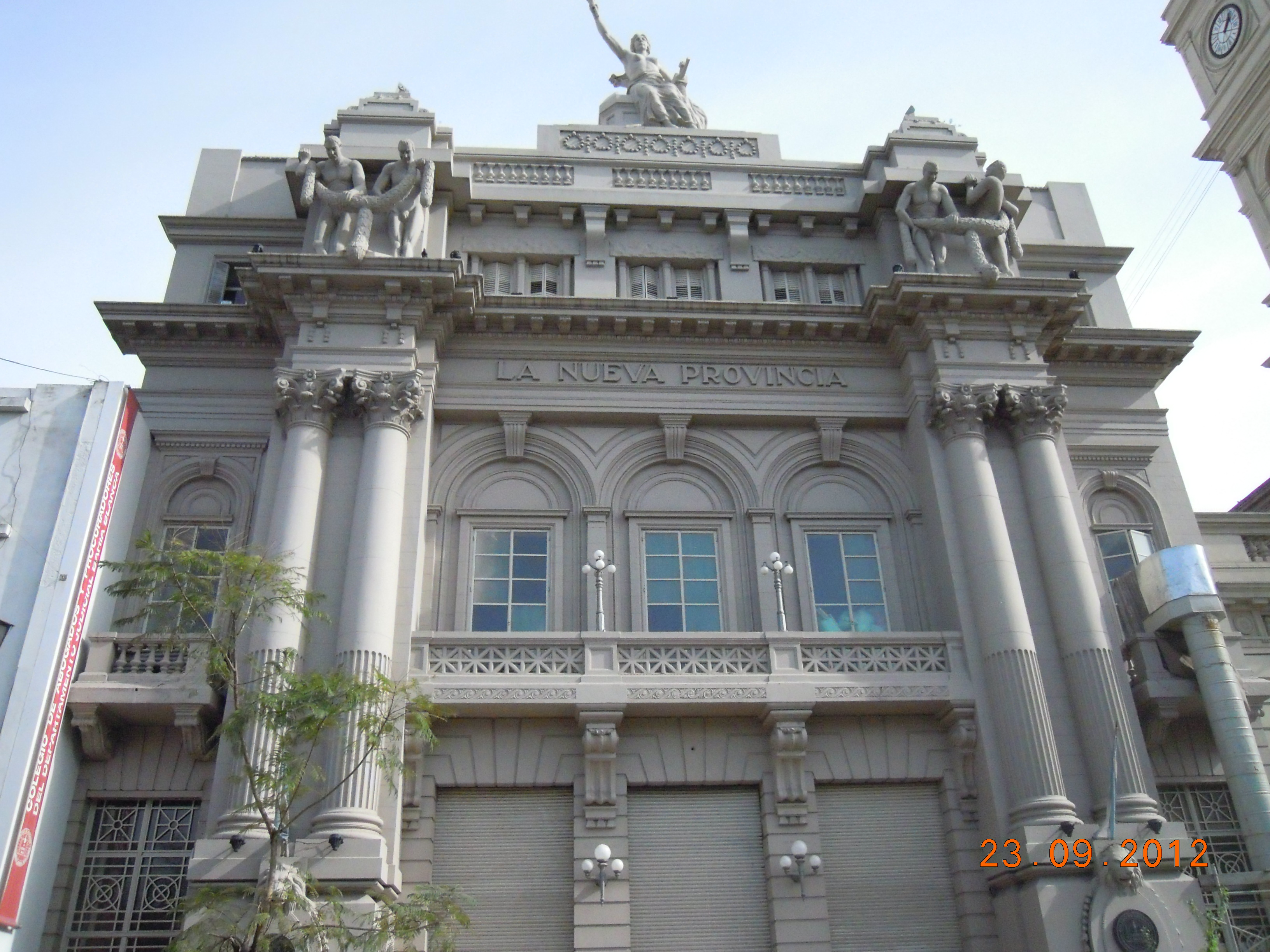 En la ciudad de Bahía Blanca-Provincia de Buenos Aires-República Argentina